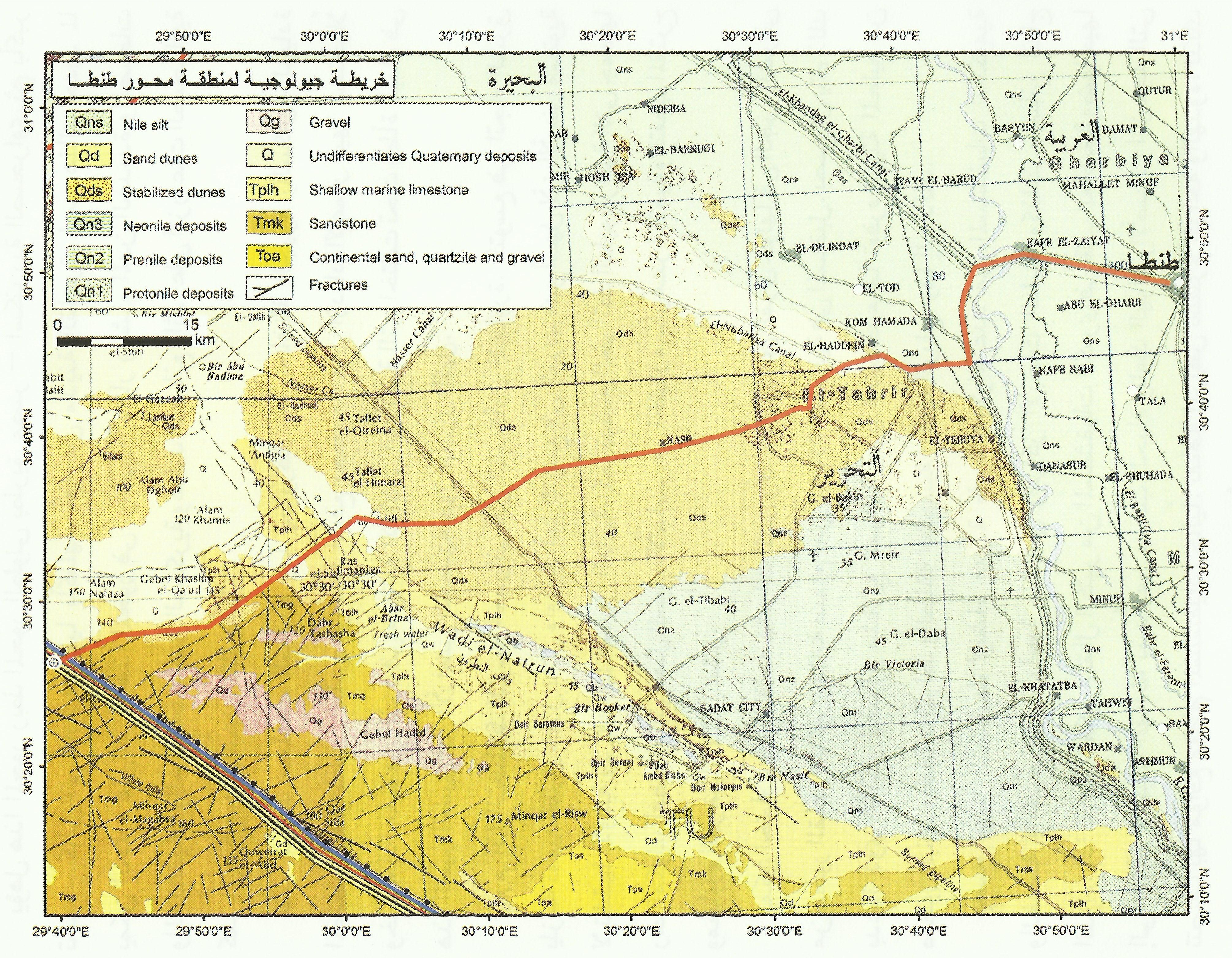 محور تعمير طنطا